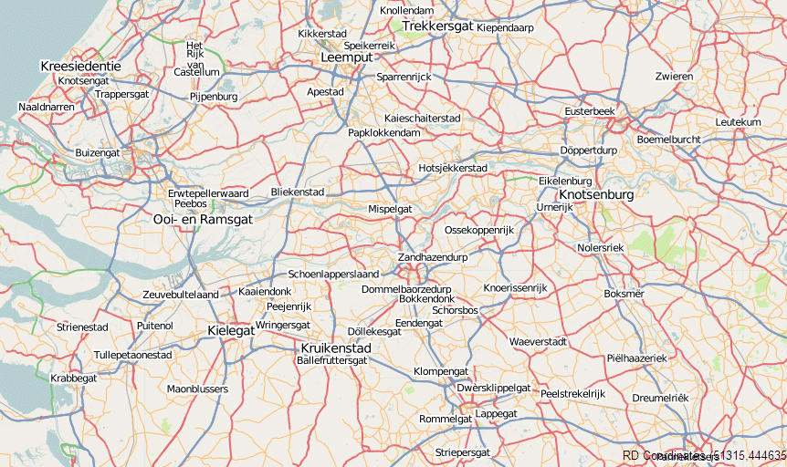 kaart met carnavalsnamen in een deel van Nederland